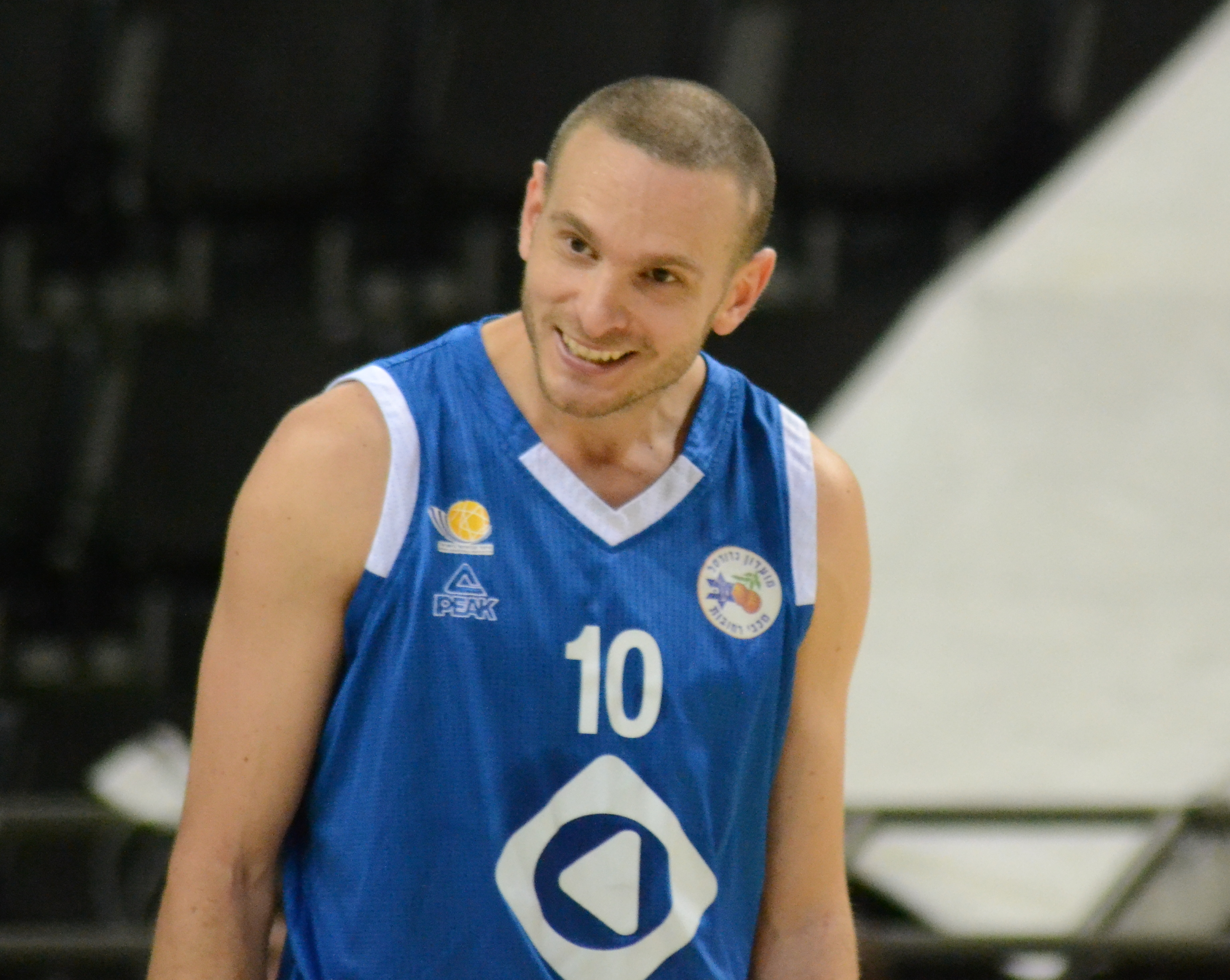 נעימי במשחק בין מכבי רחובות להפועל חיפה במסגרת הפליאוף התחתון